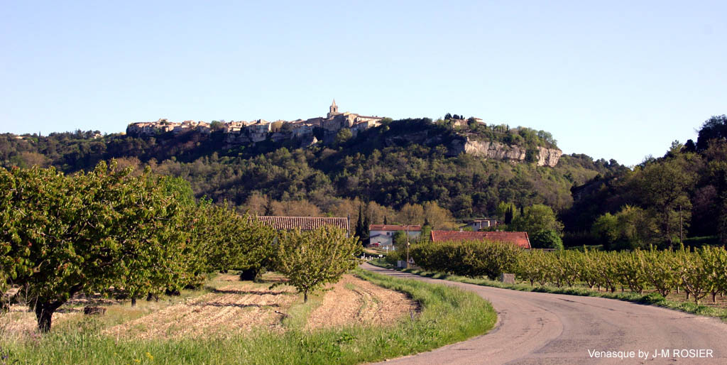 Venasque (France) church, cross and view